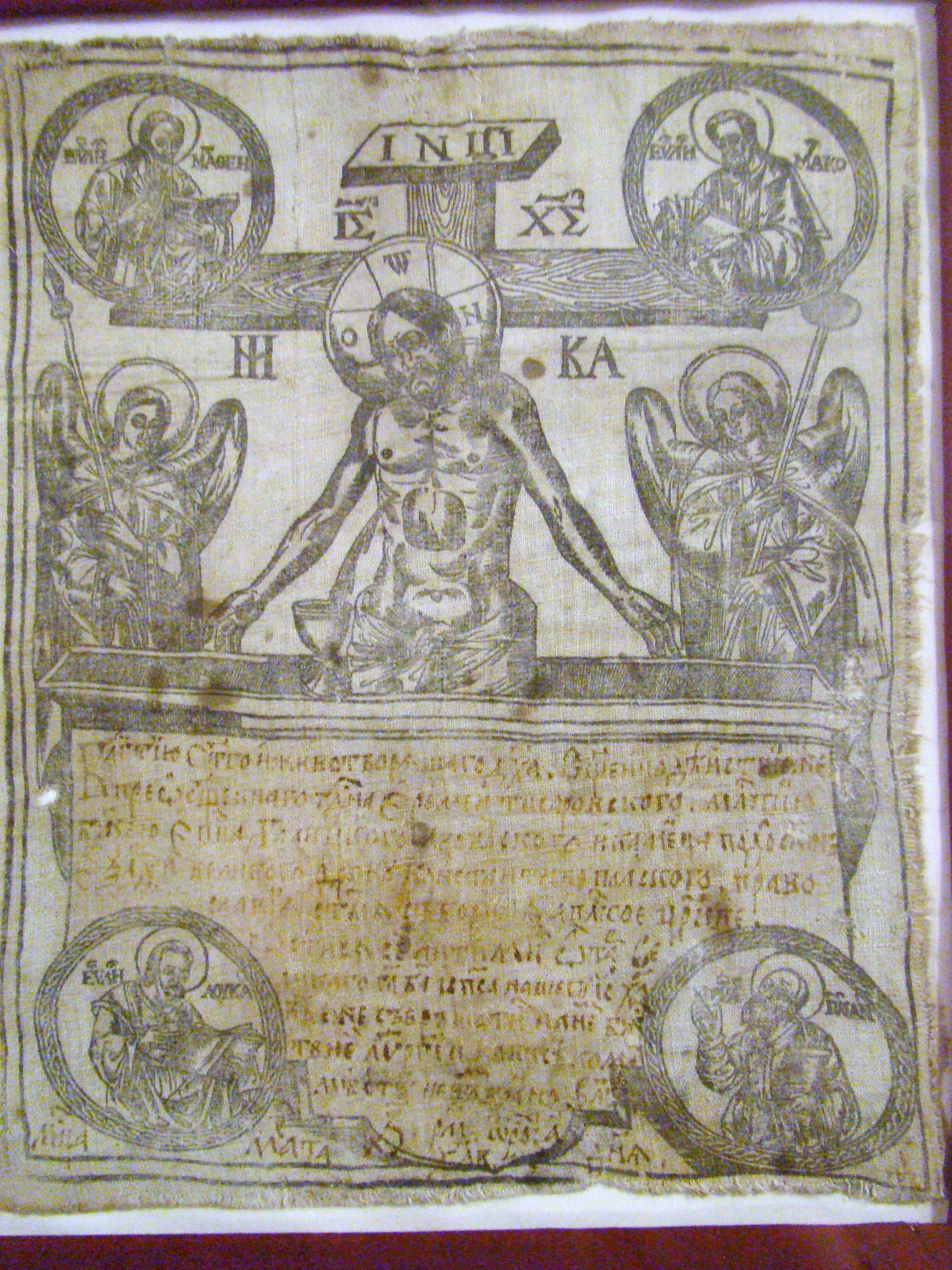 Antimisul de la 1632 al bisericii din Poienile Izei păstrat în depozitul Arhiepiscopiei Clujului